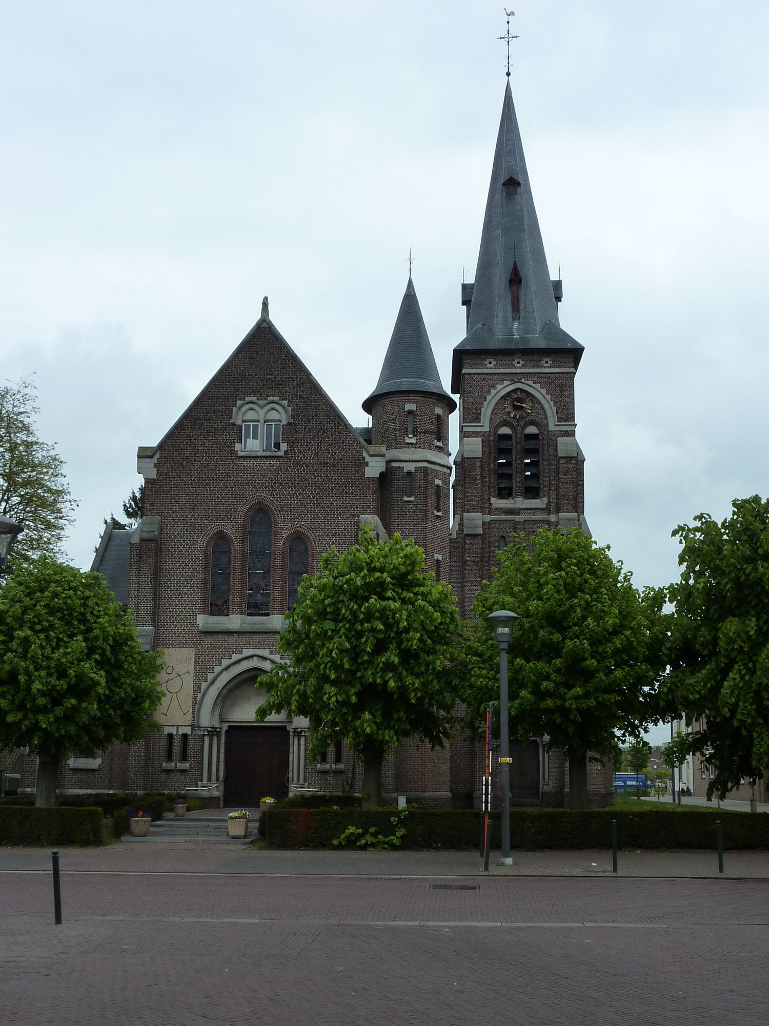 Liezele kerk